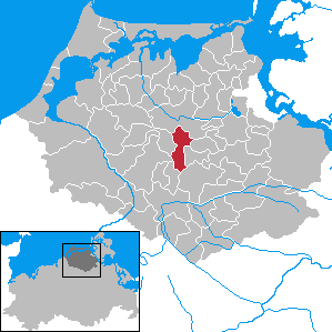 Millienhagen-Oebelitz in Mecklenburg-Vorpommern - District Nordvorpommern